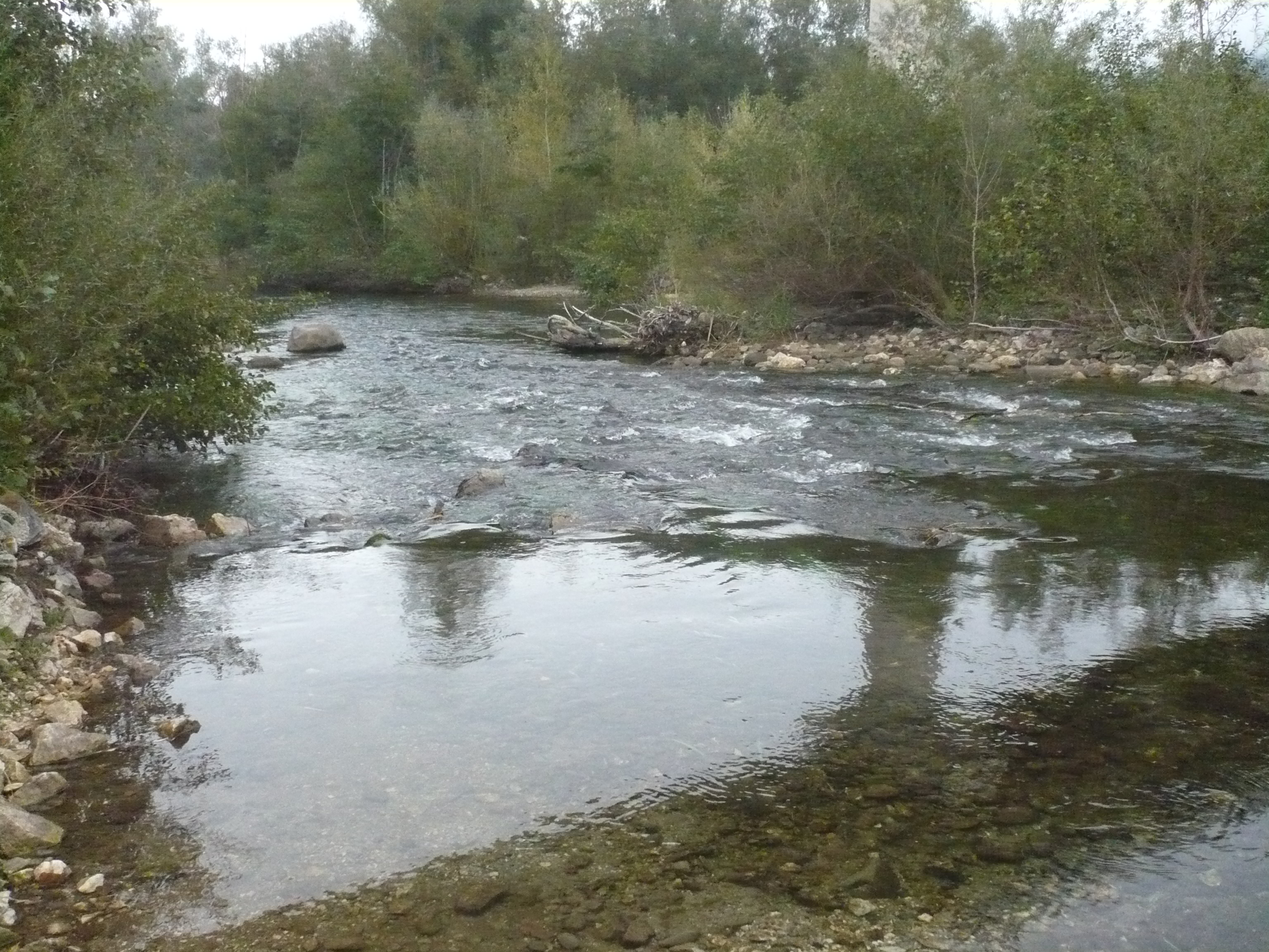 LeTech à Nidolères